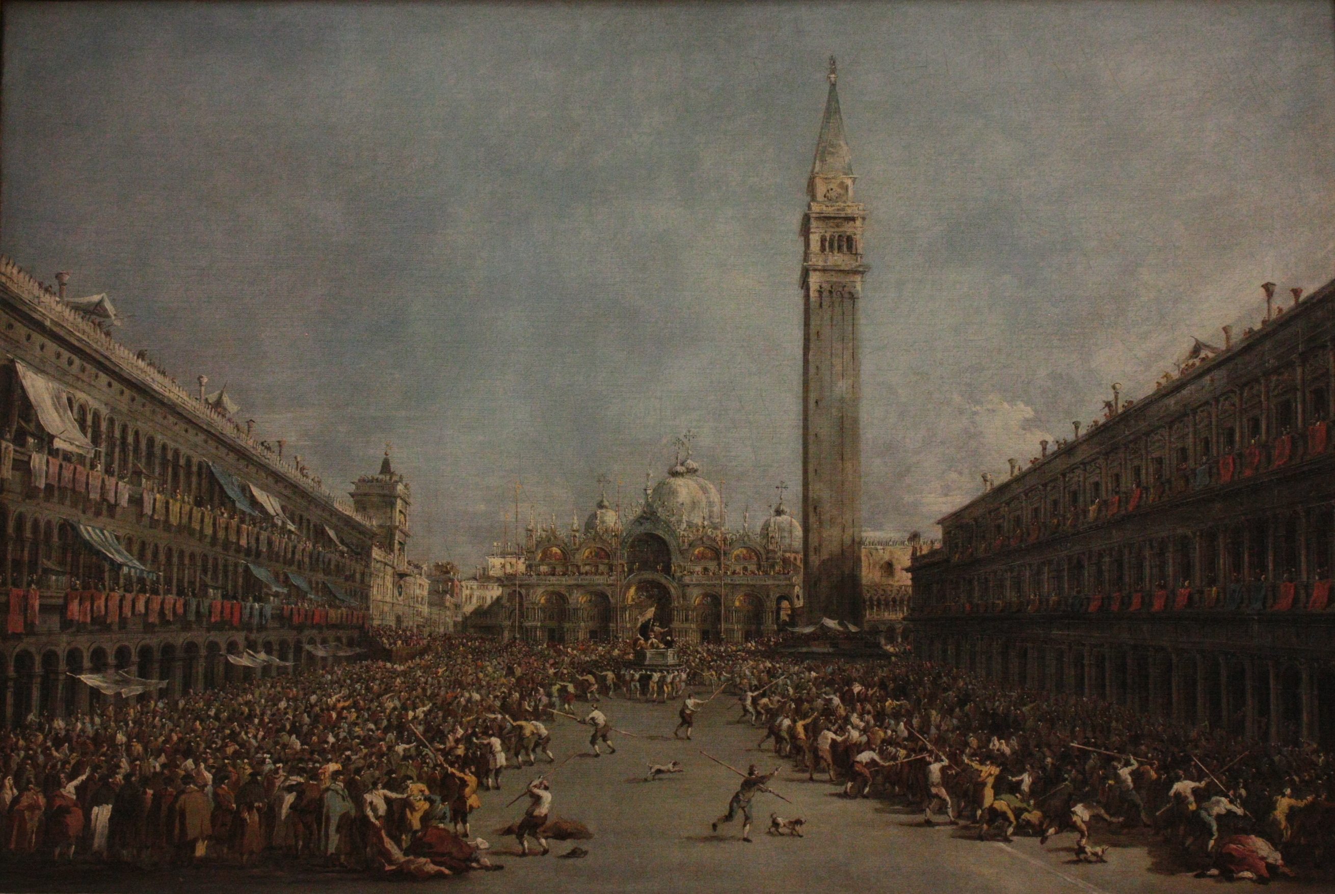 Le Doge de Venise porté par les gondoliers, après son élection sur la place Saint-Marc de Francesco Guardi, 3e quart 18e siècle